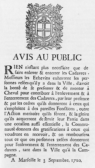 Texte original de l'avis au public concernant la peste de 1720 à Marseille